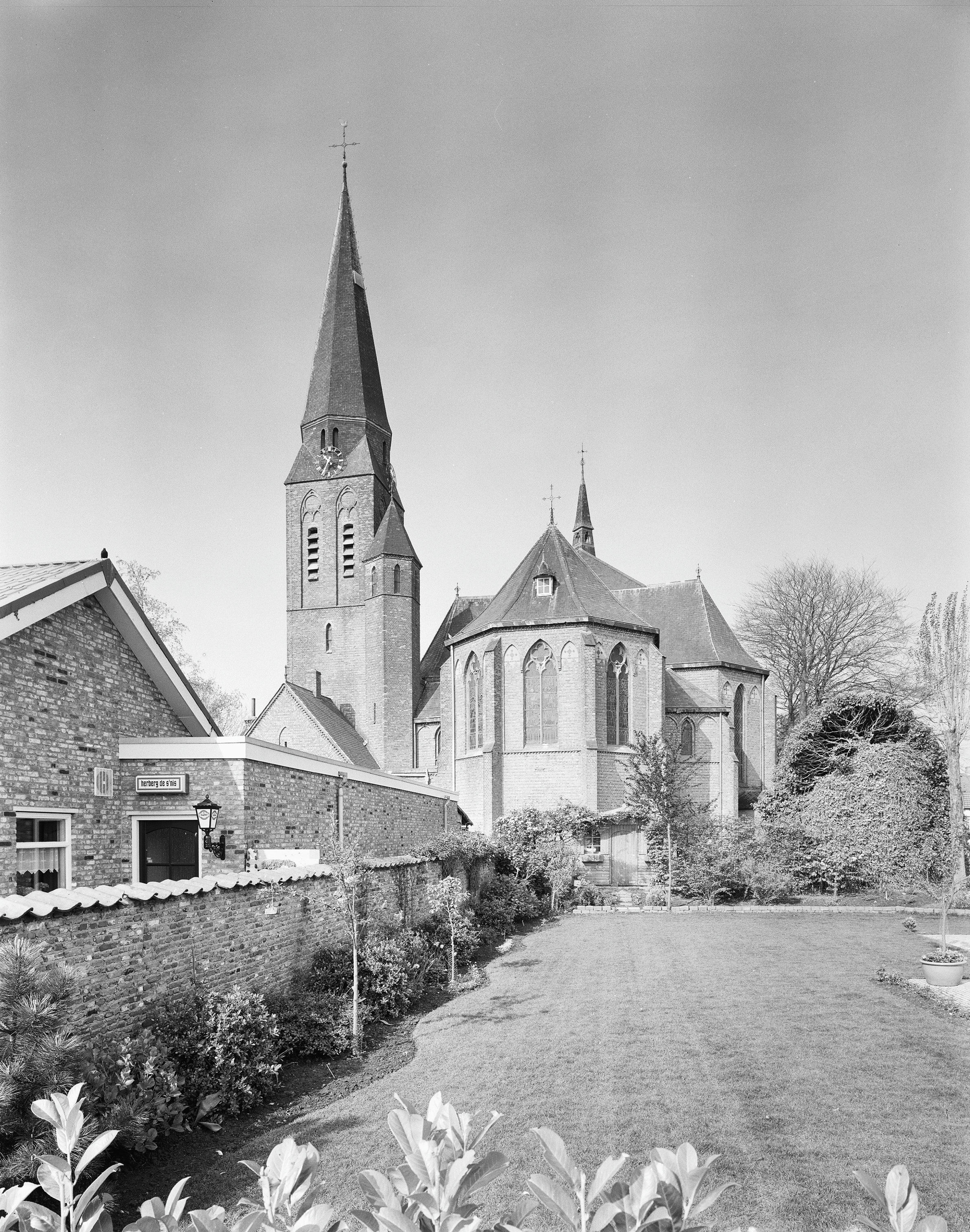 Sint Willibrorduskerk: Overzicht oostgevel met terzijde geplaatste kerktoren (opmerking: Gefotografeerd voor Monumenten In Nederland Zeeland, bladzijde 202)